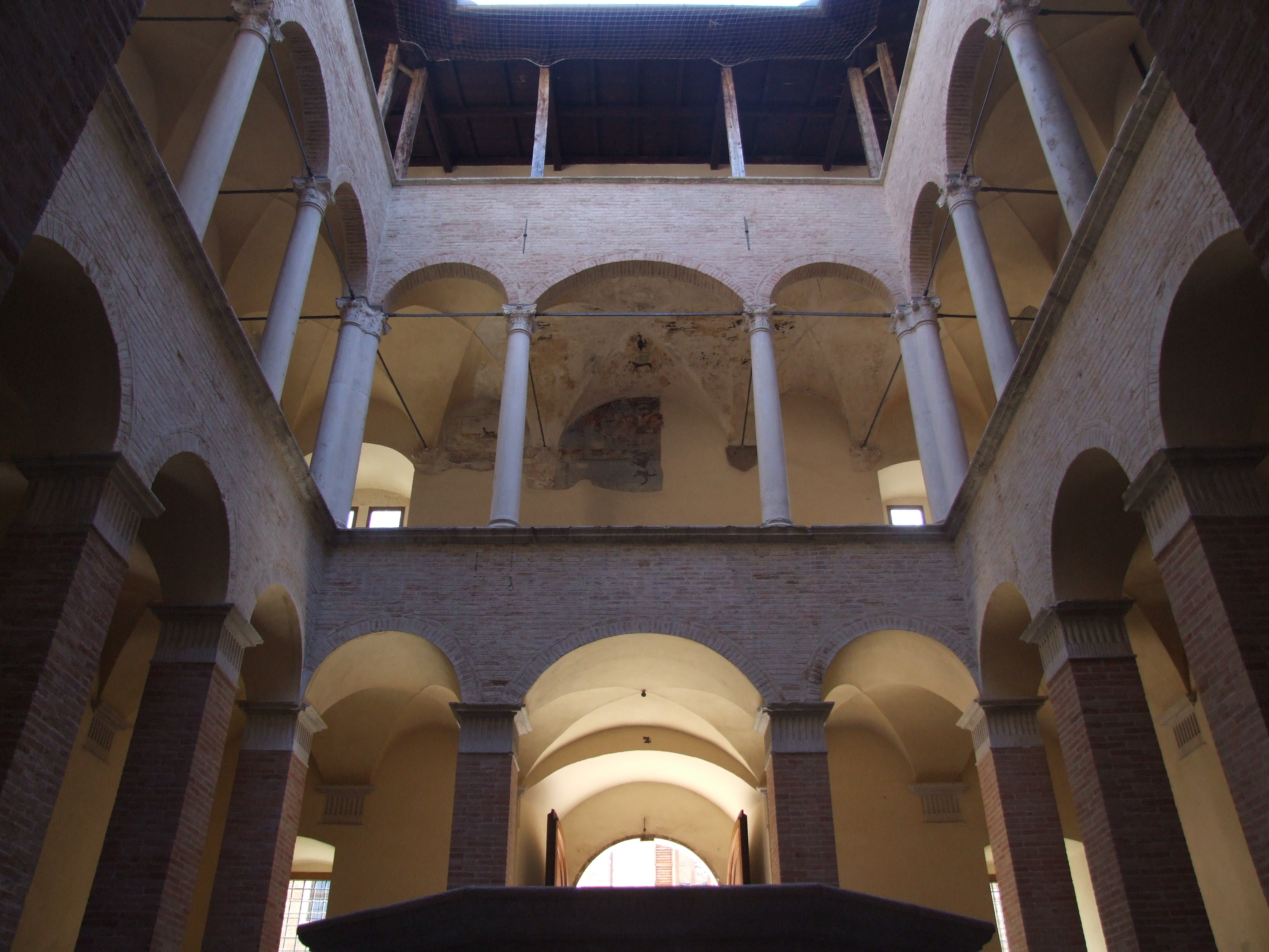 Palazzo della Signoria - cortile porticato interno disegnato da Andrea Sansovino This is a photo of a monument which is part of cultural heritage of Italy.